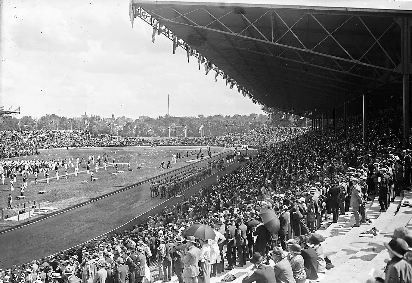 Cérémonie d'ouverture des Jeux olympiques de Paris au stade olympique de Colombes, le 5 juillet 1924.